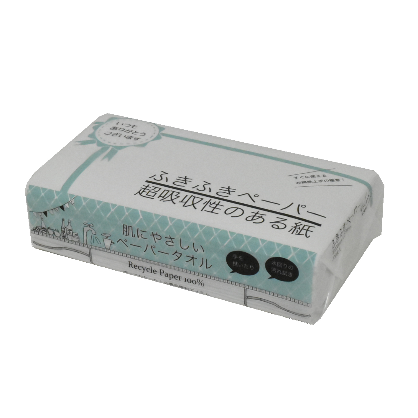 タオルペーパー（再生紙100％）２００枚入り 紺屋商事株式会社製